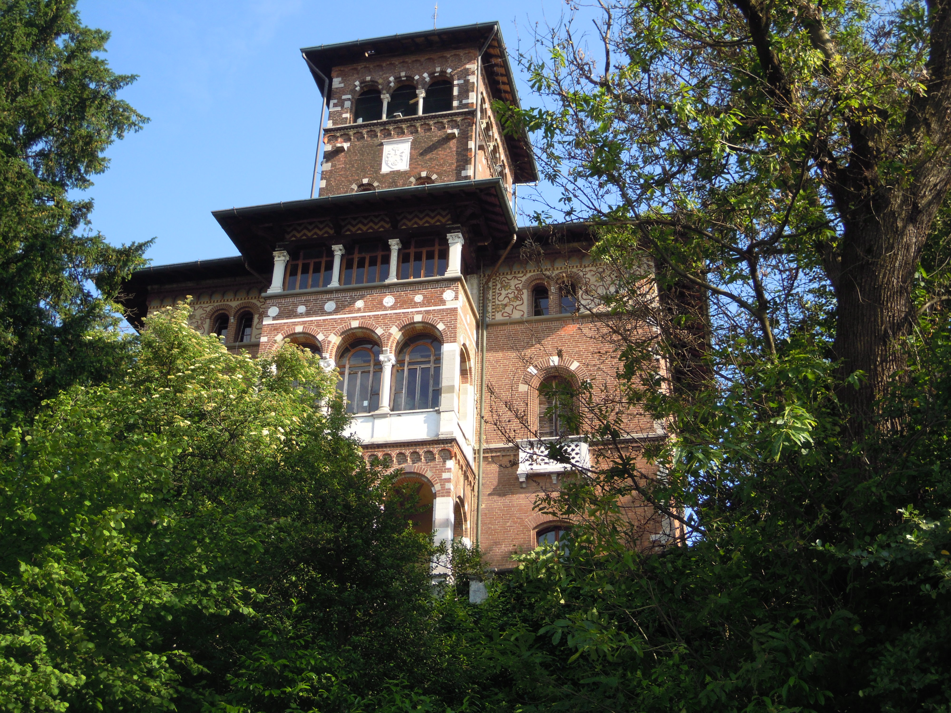 La Villa Ricci al Montevecchio di Samarate (VA) vista da Via Cinque Giornate